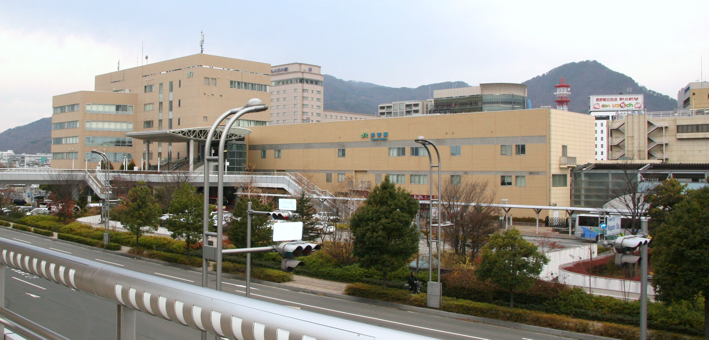 長野駅東口